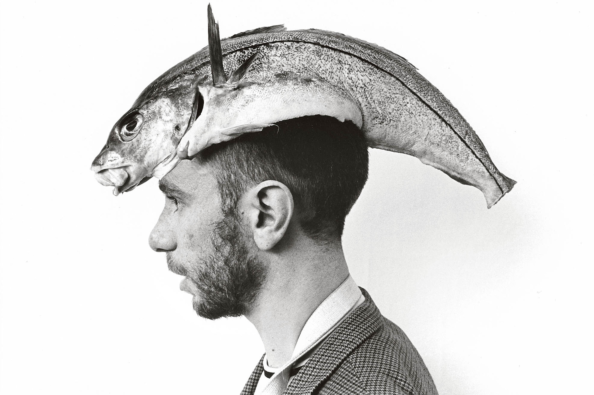 Eric De VolderEric De Volder, Vlaams beeldend kunstenaar en regisseur.